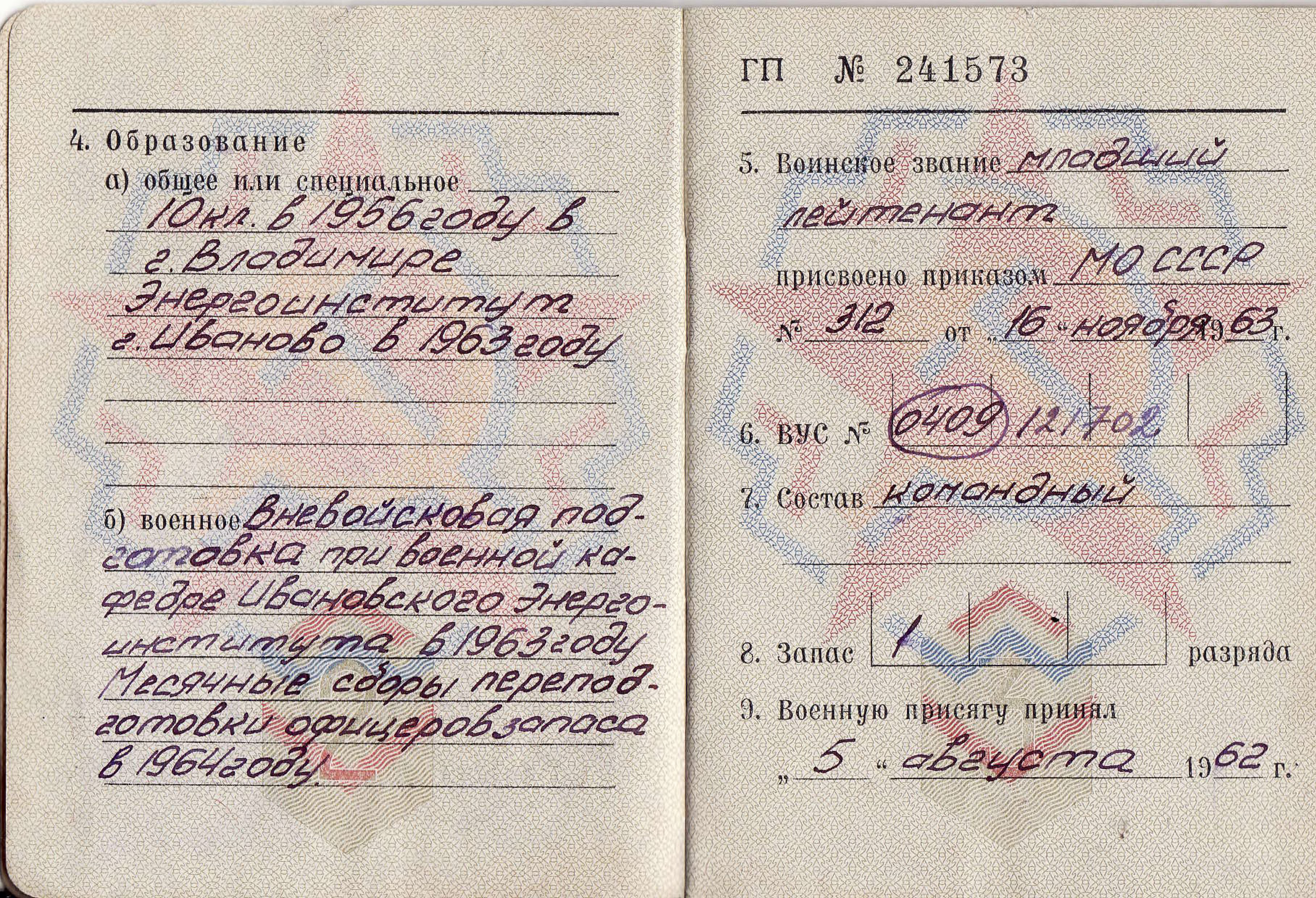 Военный билет офицера запаса вооружённых сил СССР Суворова Николая Ивановича